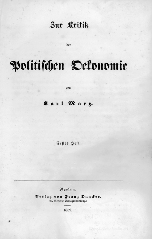 Zur Kritik der politischen Ökonomie Erstes Heft 1859